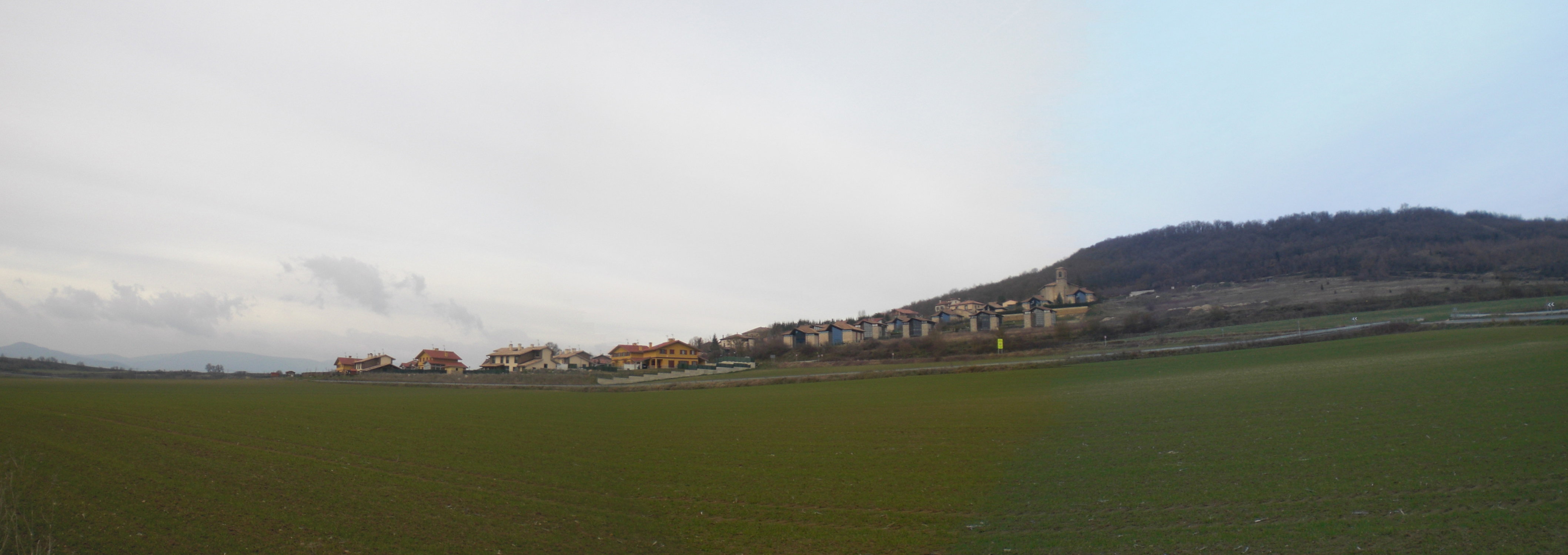 Argomaizen ikuspegia.